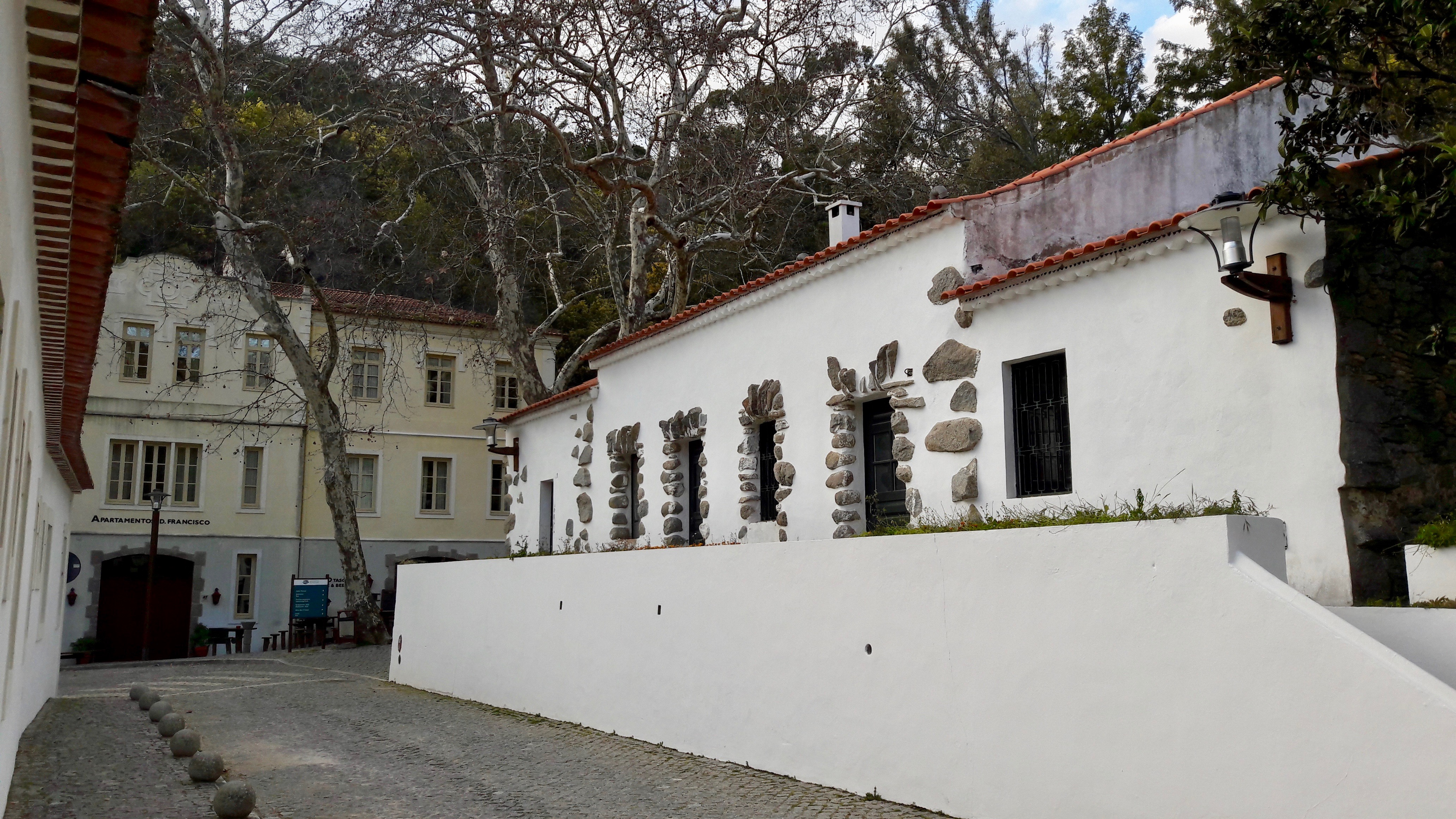 Casas nas Caldas de Monchique